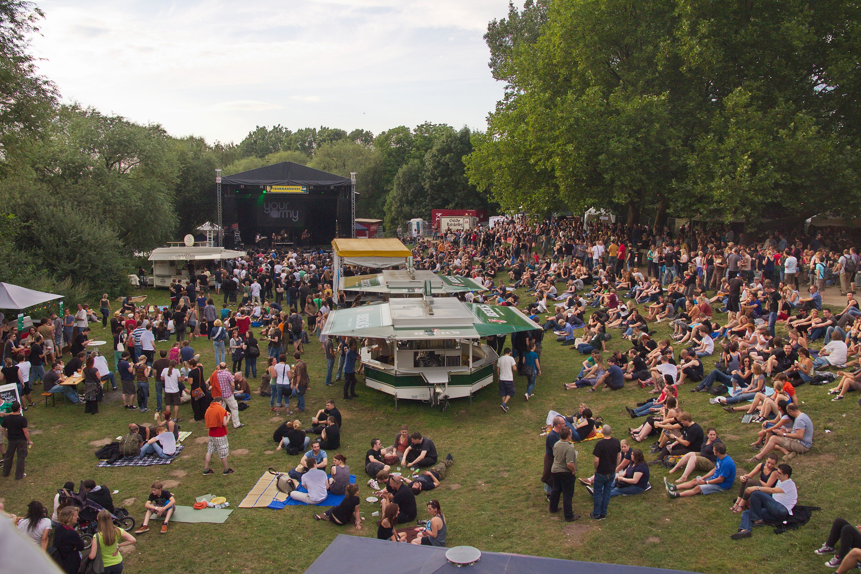 "YOUR ARMY" auf dem Fährmannsfest Hannover, Niedersachsen, Deutschland.